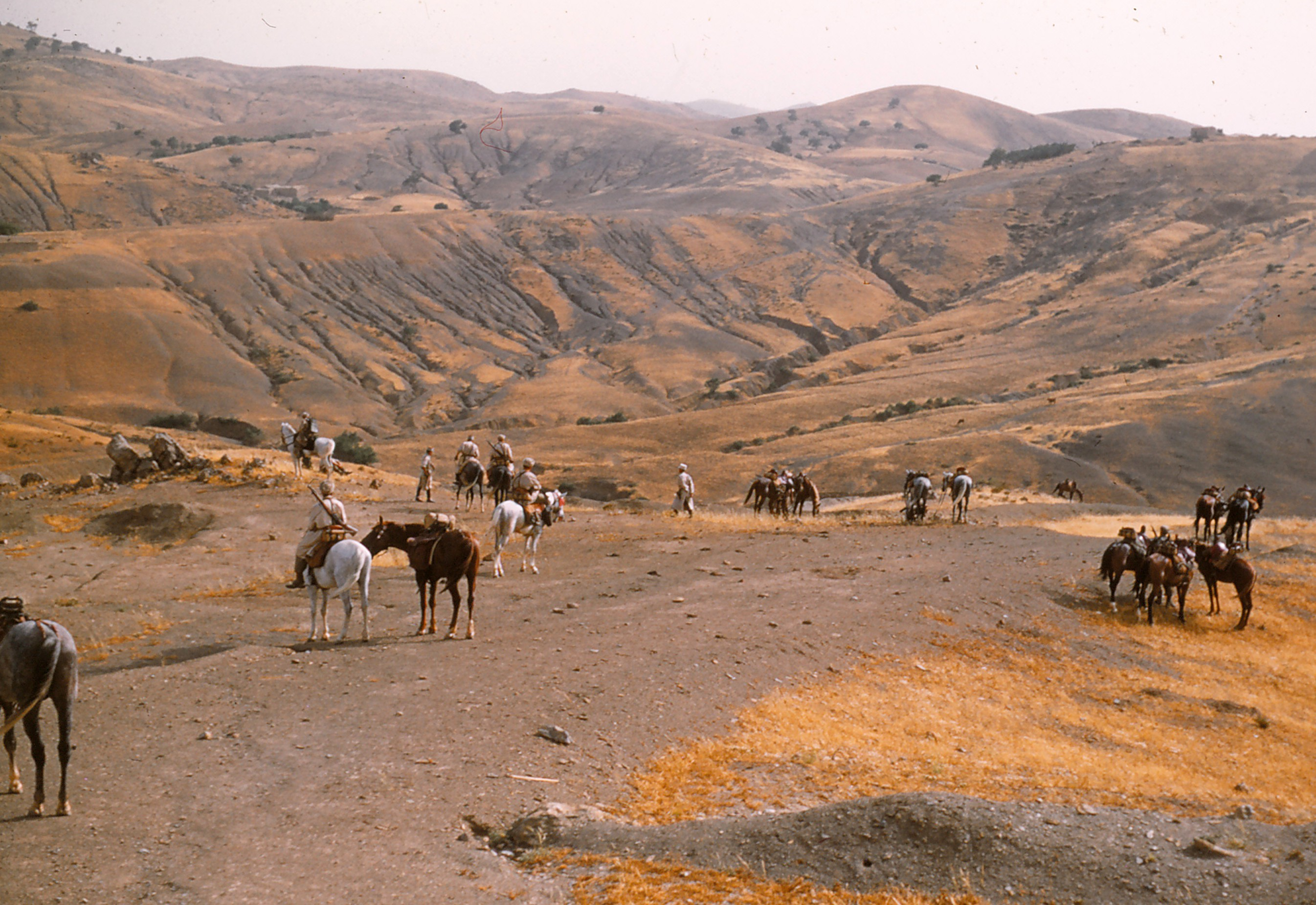 Halte d'un peloton et paysage typique.